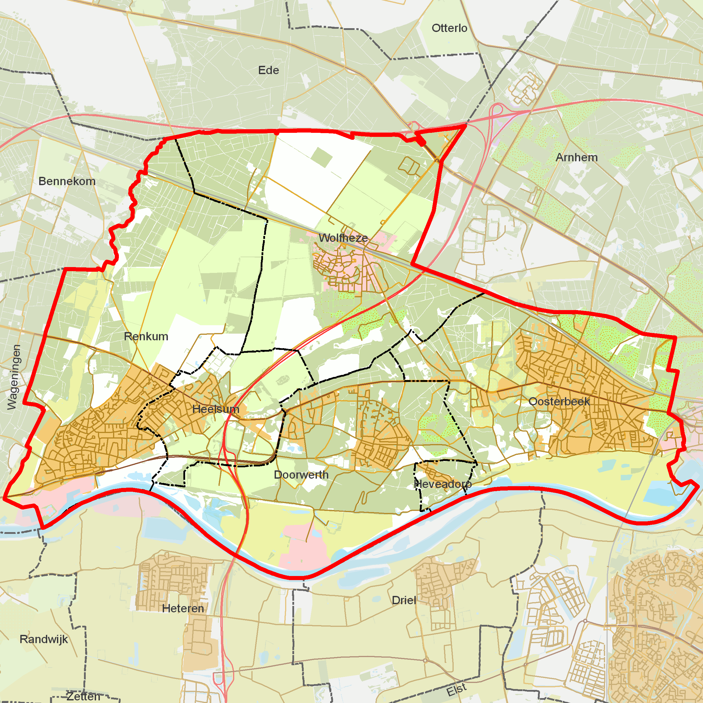 BAG woonplaatsen - Gemeente Renkum.png